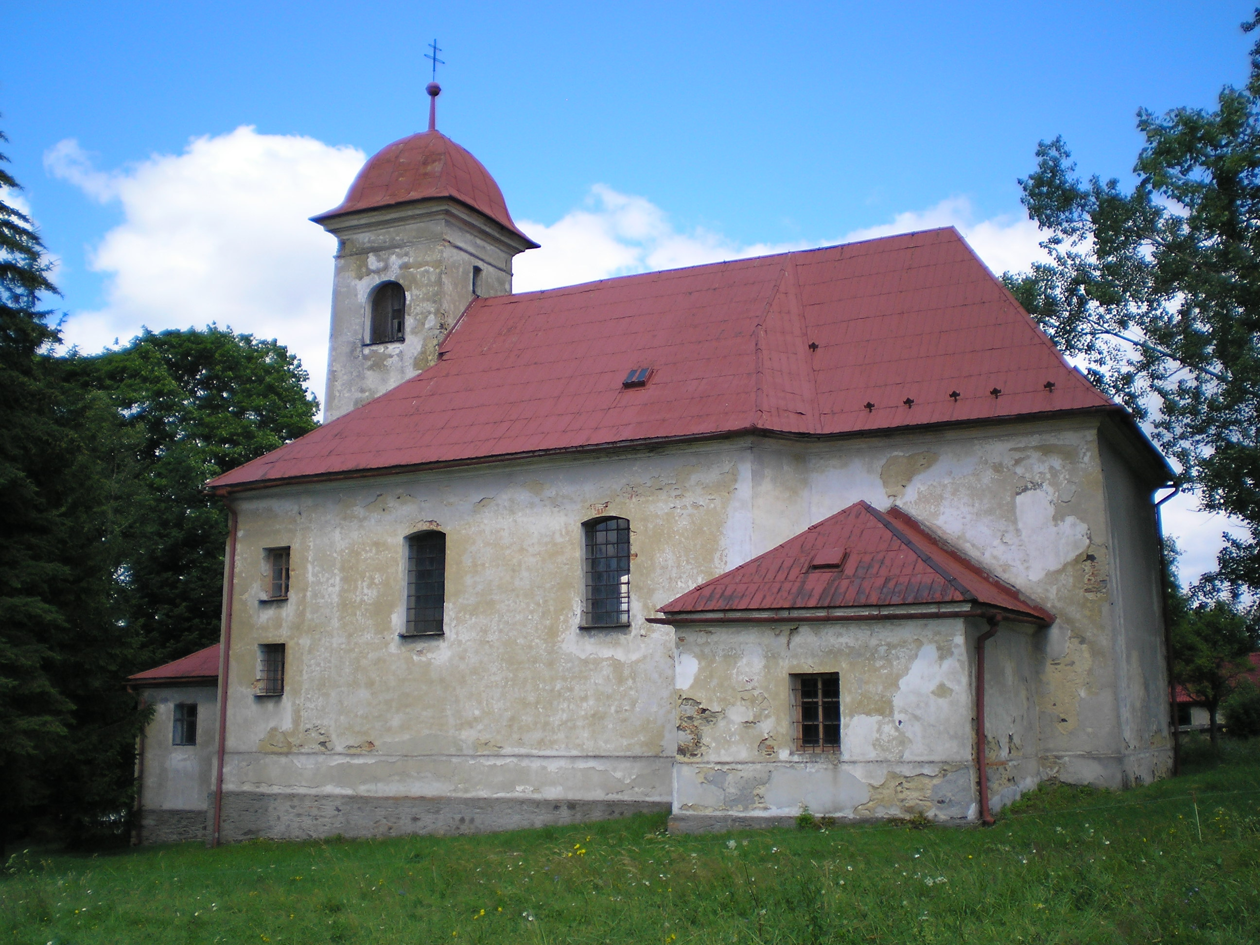 Nové Valteřice, kostel Nanebevzetí Panny Marie